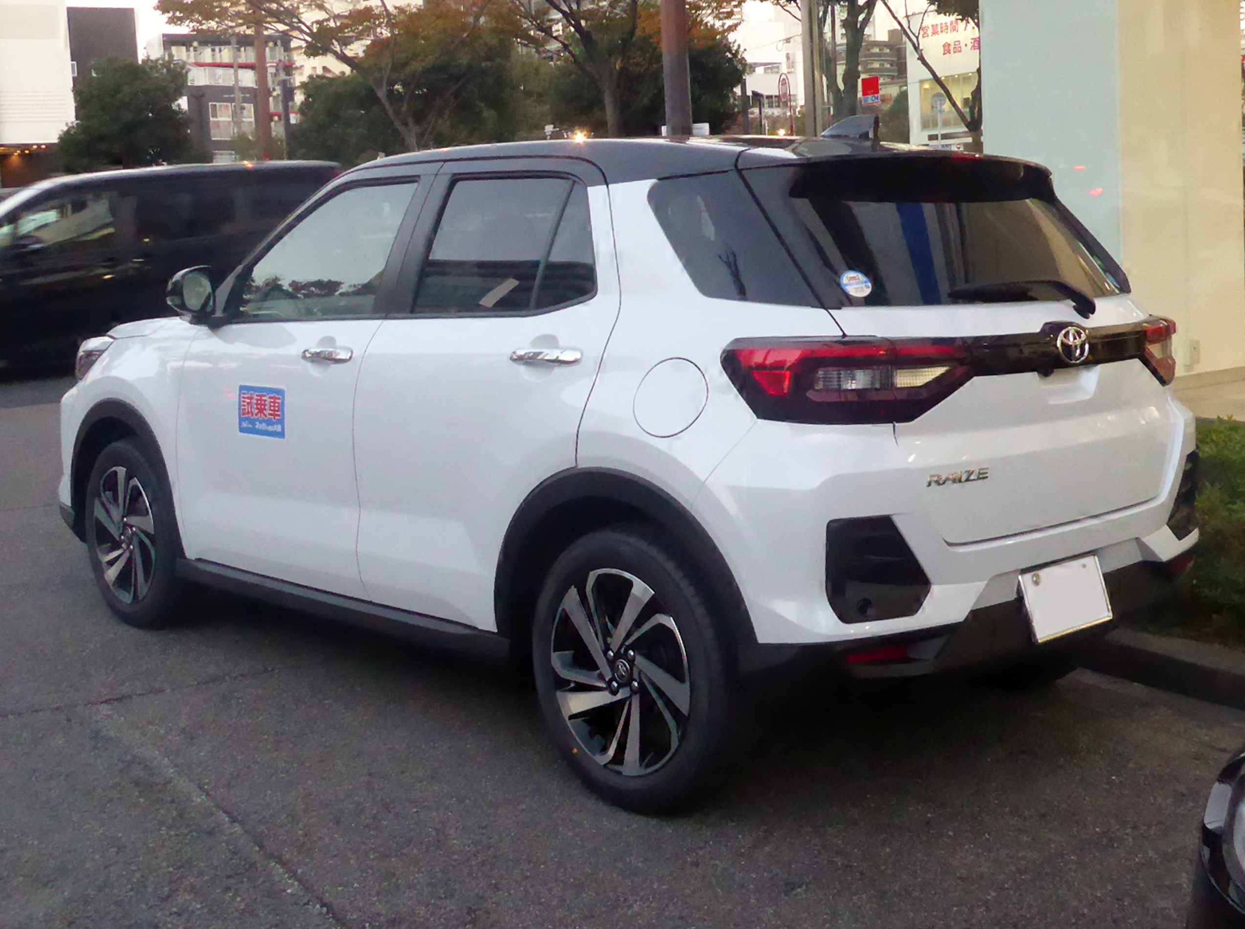 5BA-A200A-GBSV型トヨタ・ライズZ 2WDをリアから撮影。